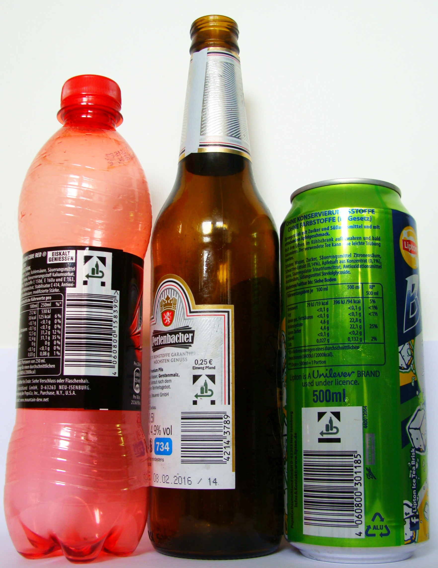 Getränkeverpackungen zu 0,5 Liter zwangsbepfandet in Deutschland via DPG zu 25 €-Cent. Repräsentiert die 3 Rückgabe- und Rohstoffgruppen (v.l.n.r.) PET, Glas, Dose.